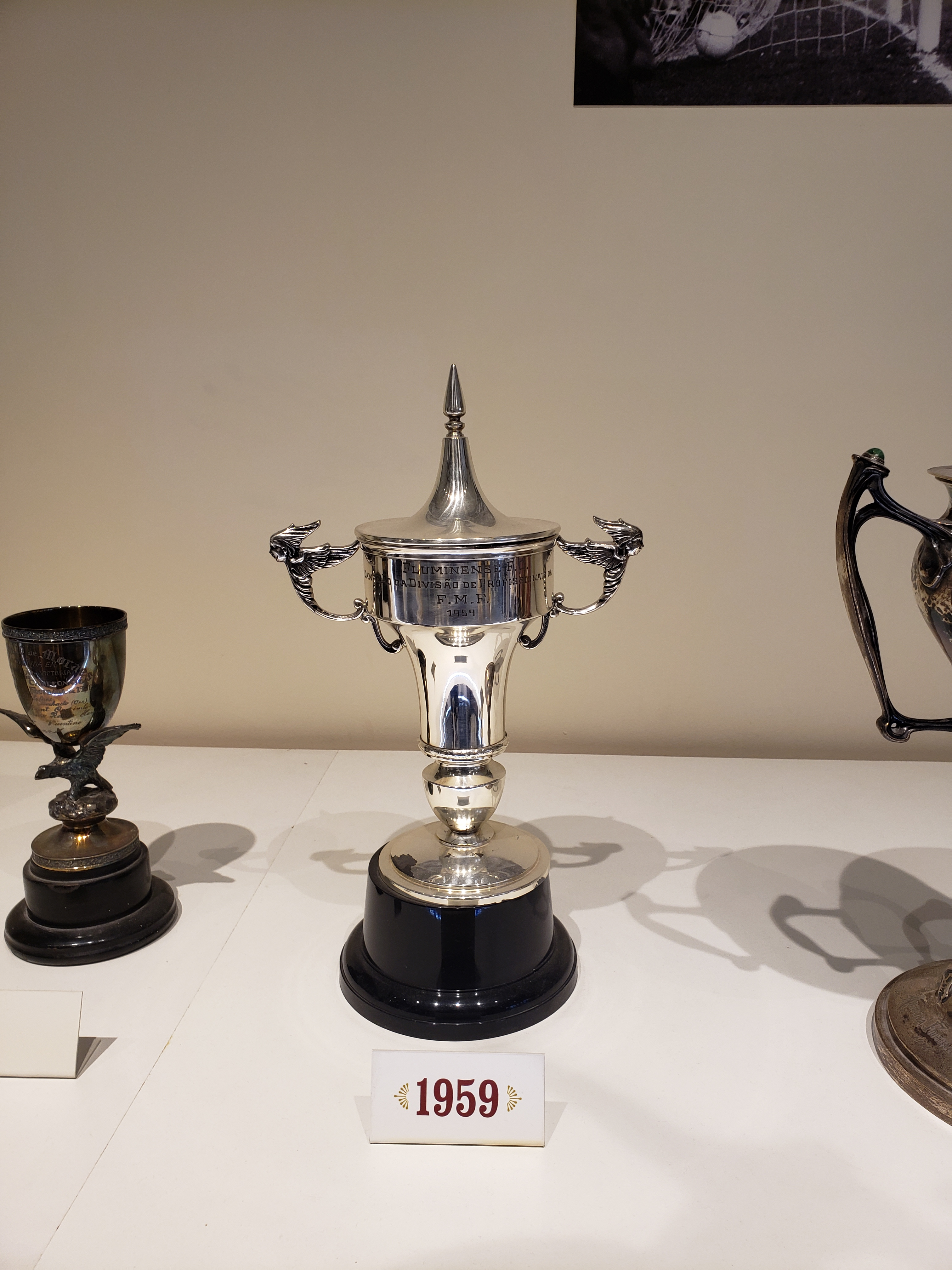 Taça do Campeonato Carioca de Futebol de 1959, conquistado pelo Fluminense Footbal Club.